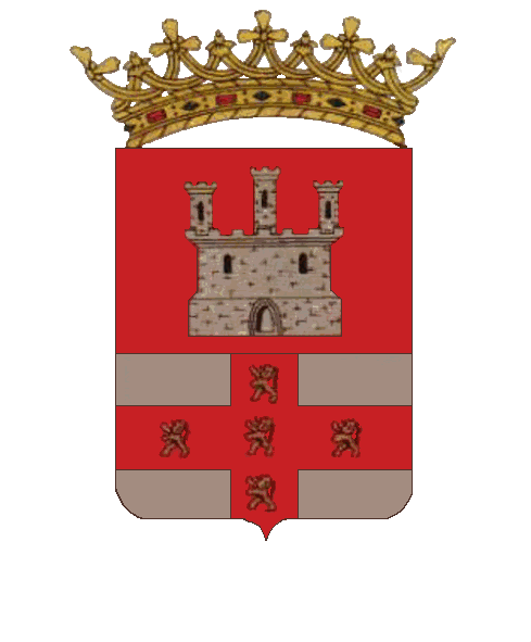 Escudo oficial de Almodóvar del Río.